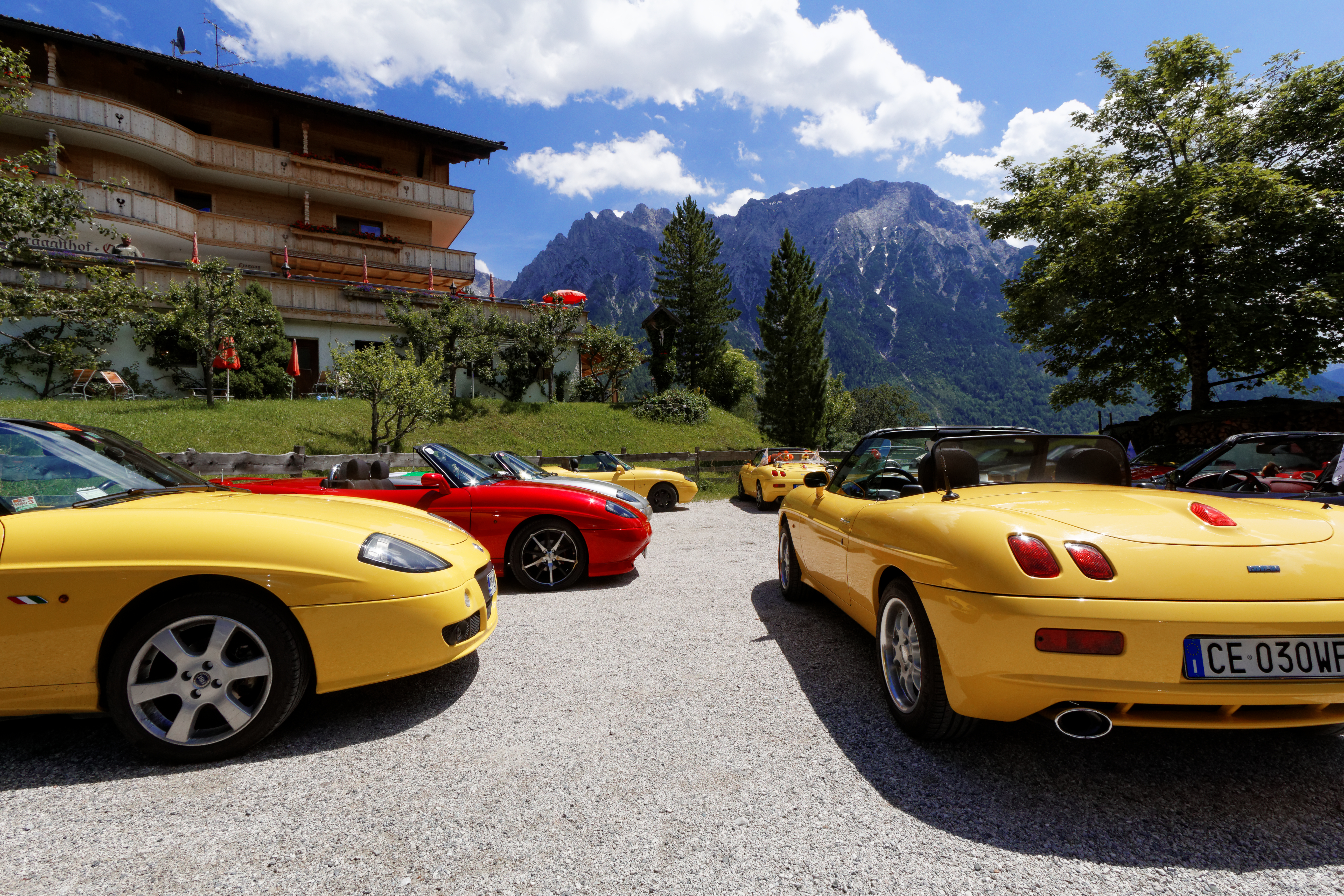 Fiat Barchetta Treffen in Tirol